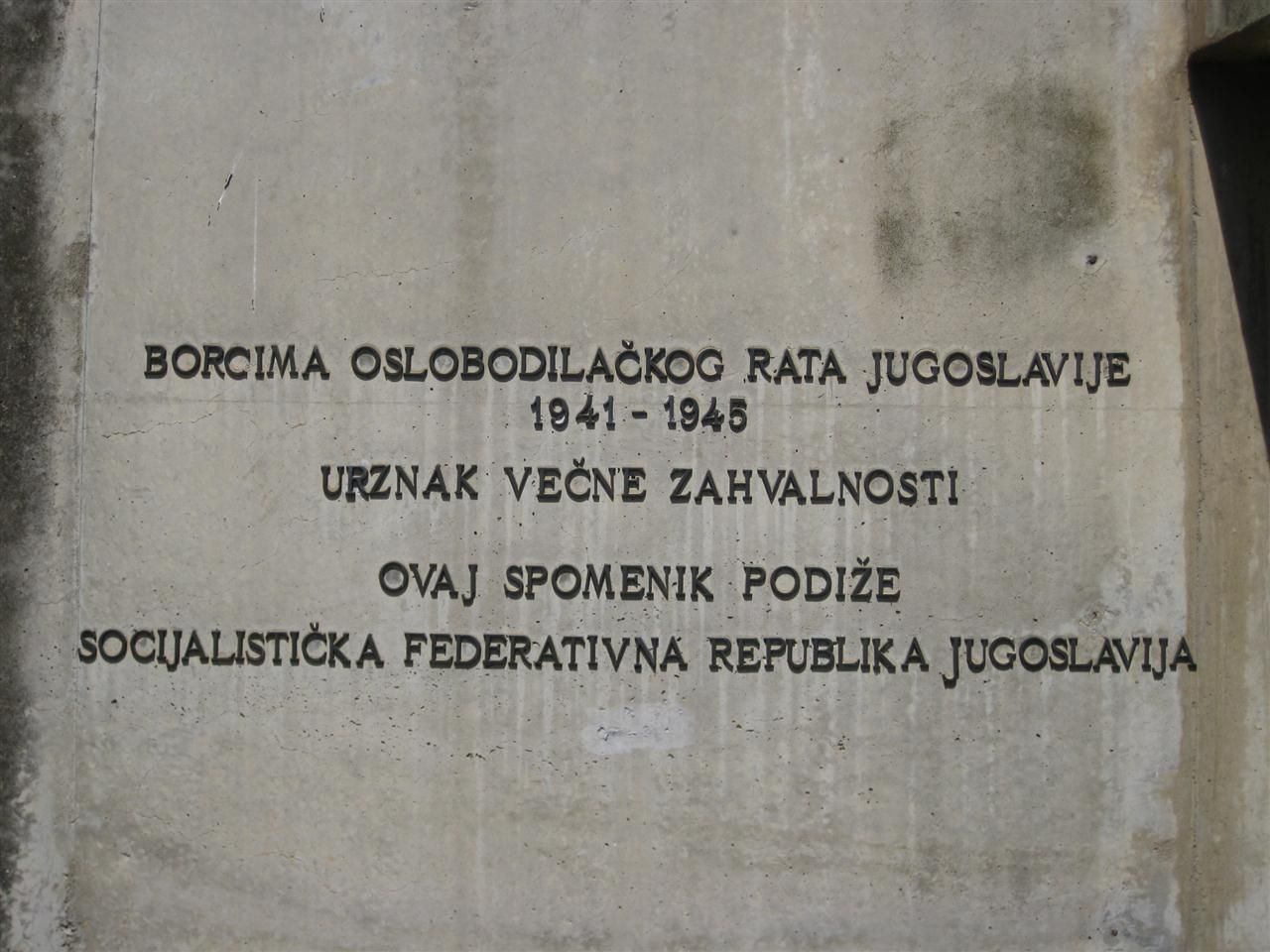 Ossario Commemorativo dei Caduti Slavi, costruito nel cimitero di Barletta alla fine degli anni sessanta su iniziativa del Sindaco Michele Morelli ed inaugurato il 4 luglio 1970. Progettato dallo scultore Dušan Džamonja, Custodisce i resti di 825 morti e di altri 463 combattenti dei quali non erano state reperite le spoglie, per un totale di 1288 caduti slavi. Di grande impatto è l'apertura circolare nel pavimento della sala principale, rivestito da un mosaico di colore rosso vivo per simboleggiare il sangue versato dai combattenti jugoslavi in occasione della resistenza antifascista e antinazista italiana.